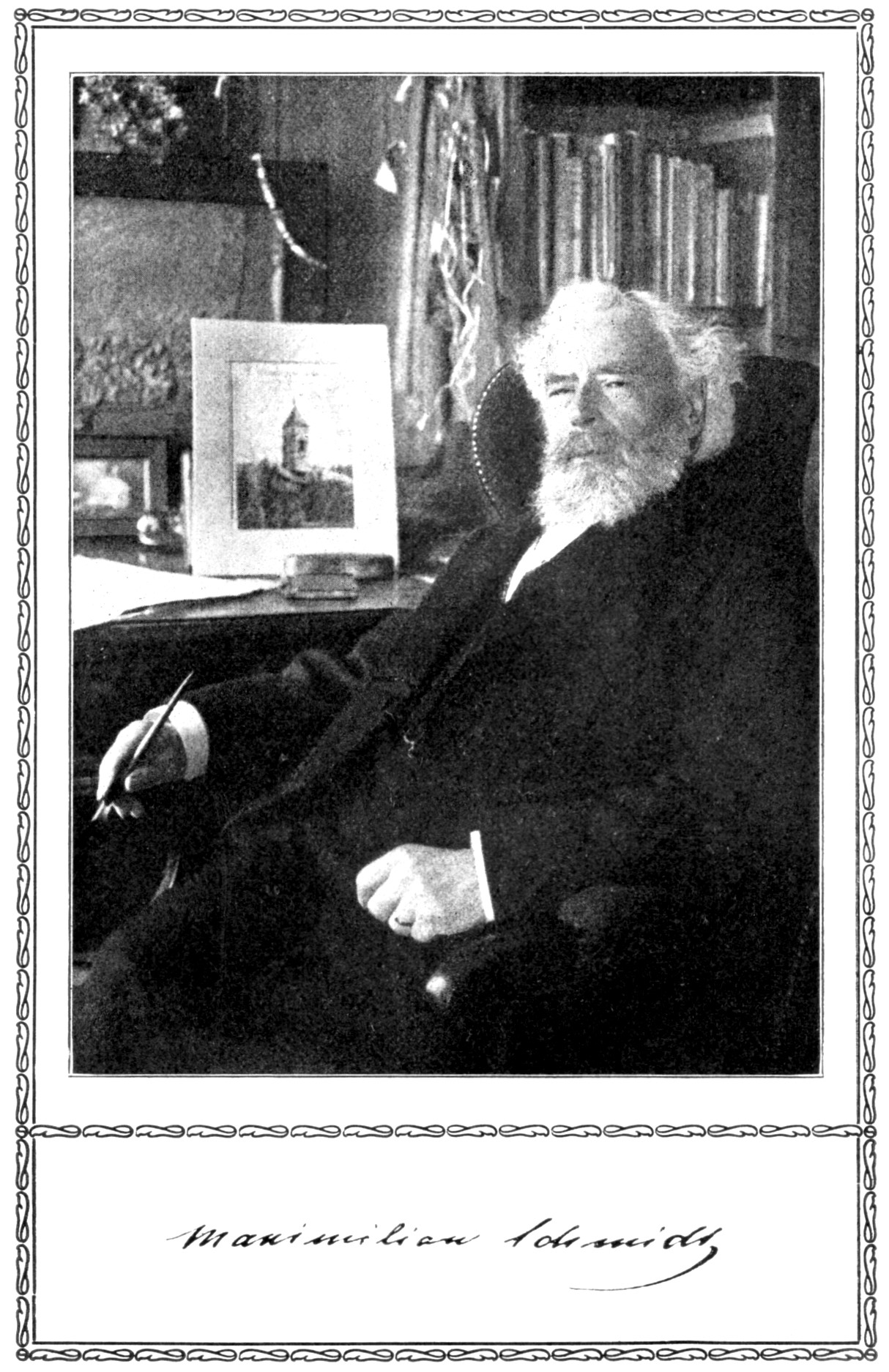 Porträt des Schriftstellers Maximilian Schmidt vor 1912